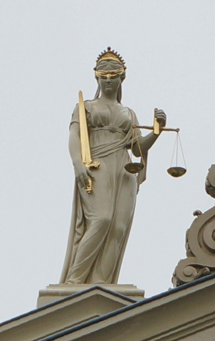 Vrouwe Justitia op het Paleis van Justitie, Martinetsingel 2, Zutphen